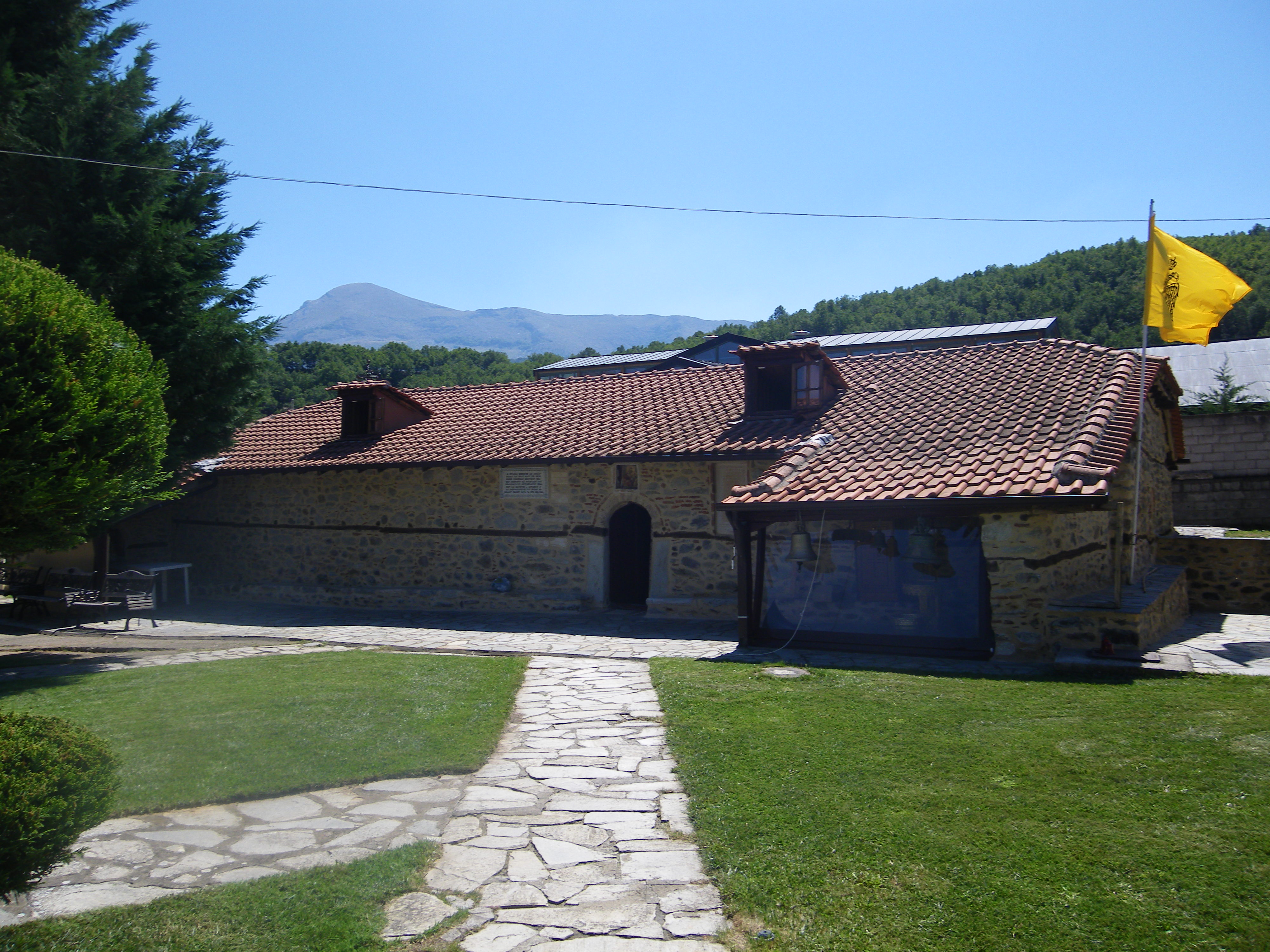 Καθολικό Ιεράς Μονής Κοιμήσεως της Θεοτόκου Σισανίου